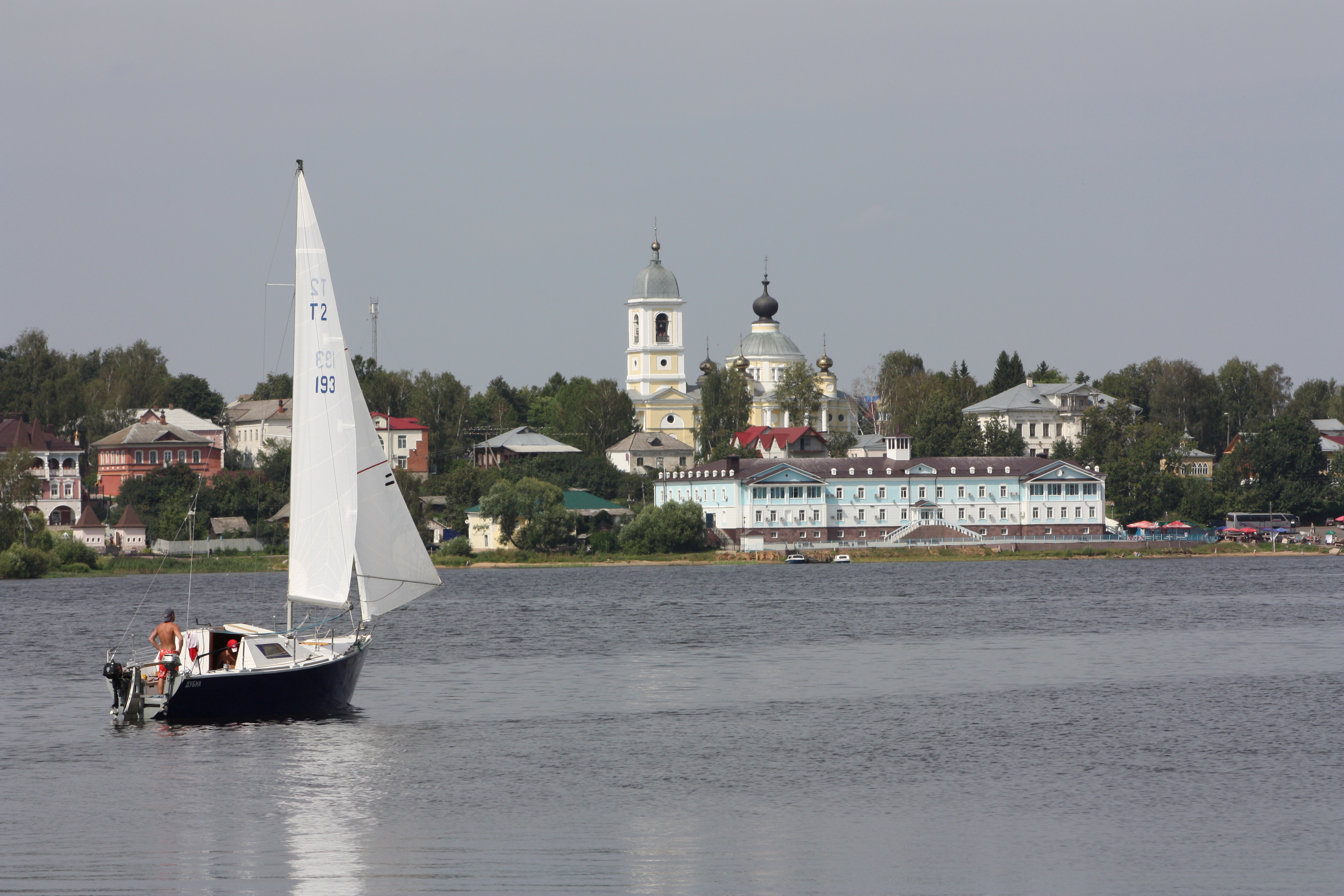 Город Мышкин в 2012 году